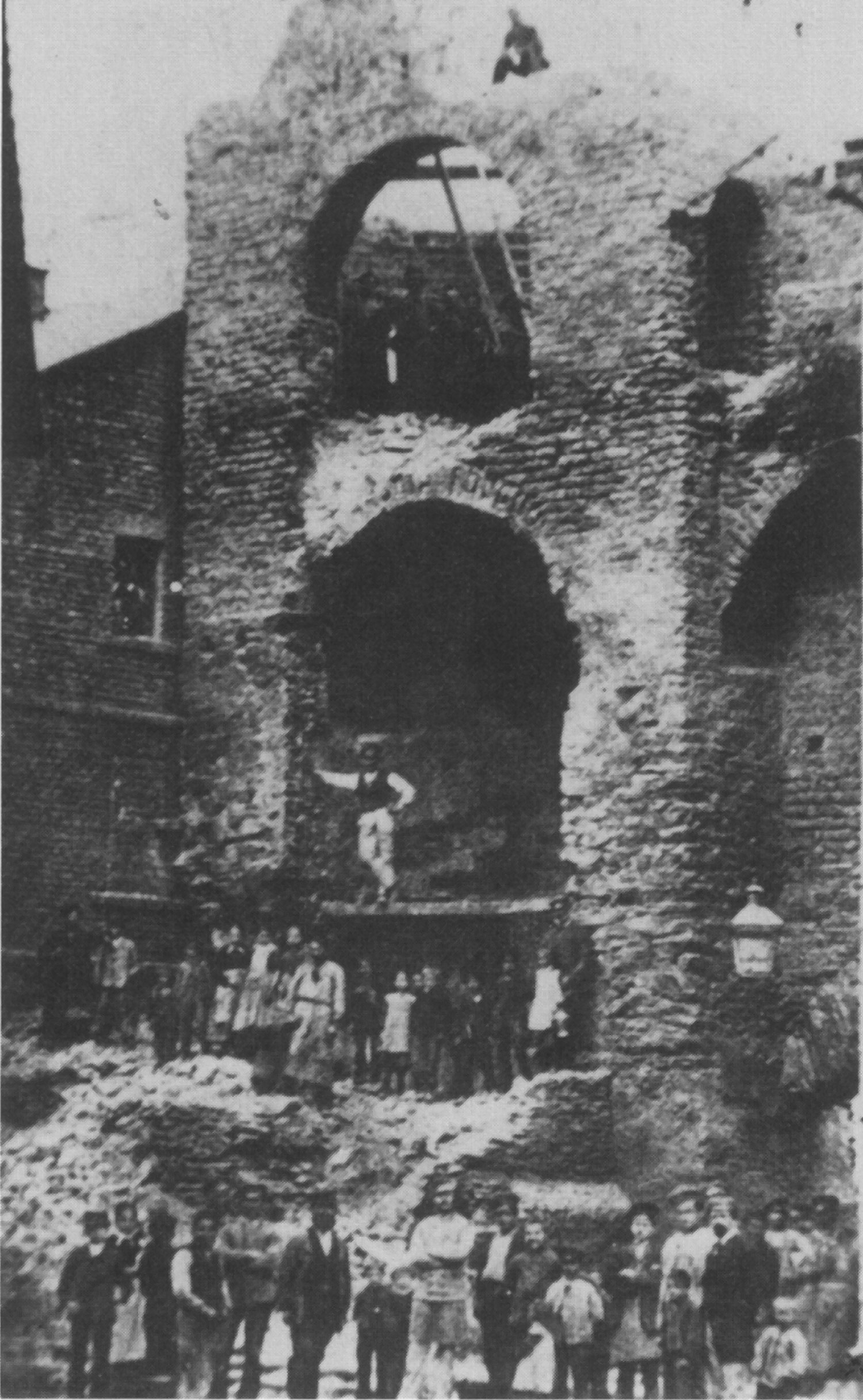 Bildbeschreibung: ...Niederlegung des Grabentores in Andernach 1880 Quelle: .. selbst eingescannt